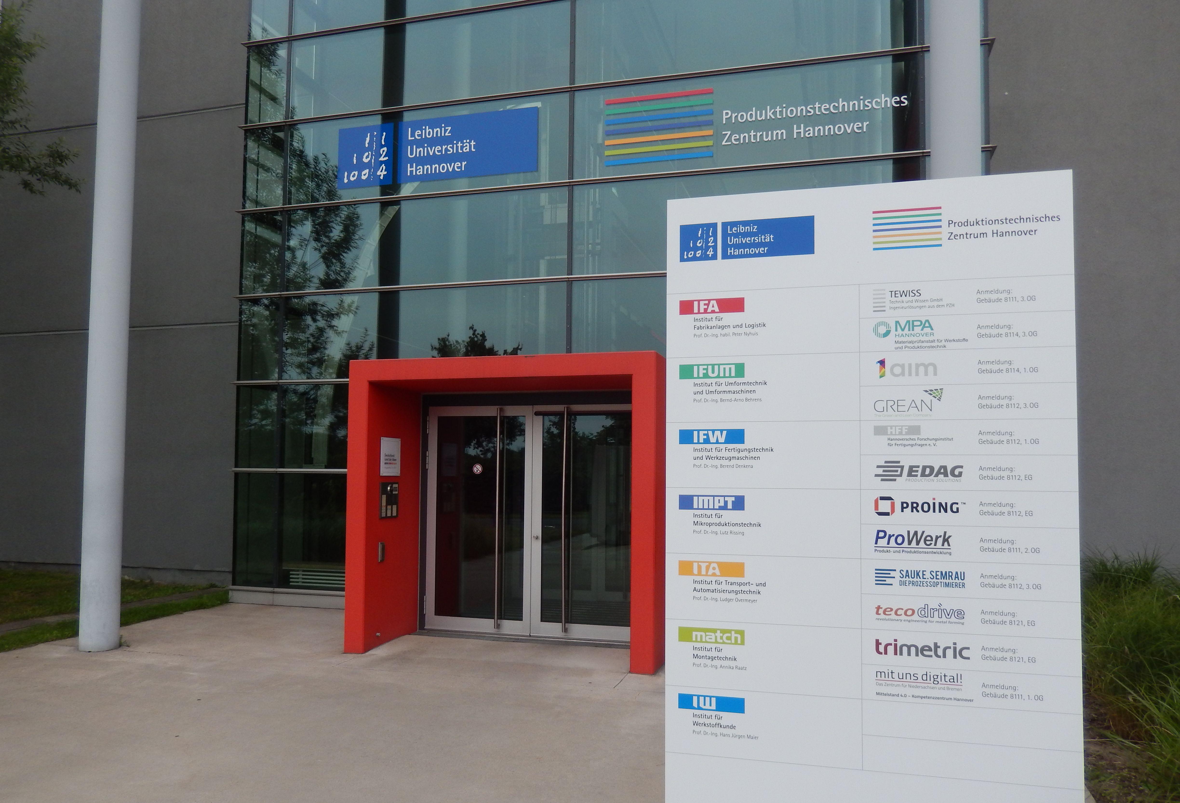 Produktionstechnisches Zentrum Hannover in Garbsen